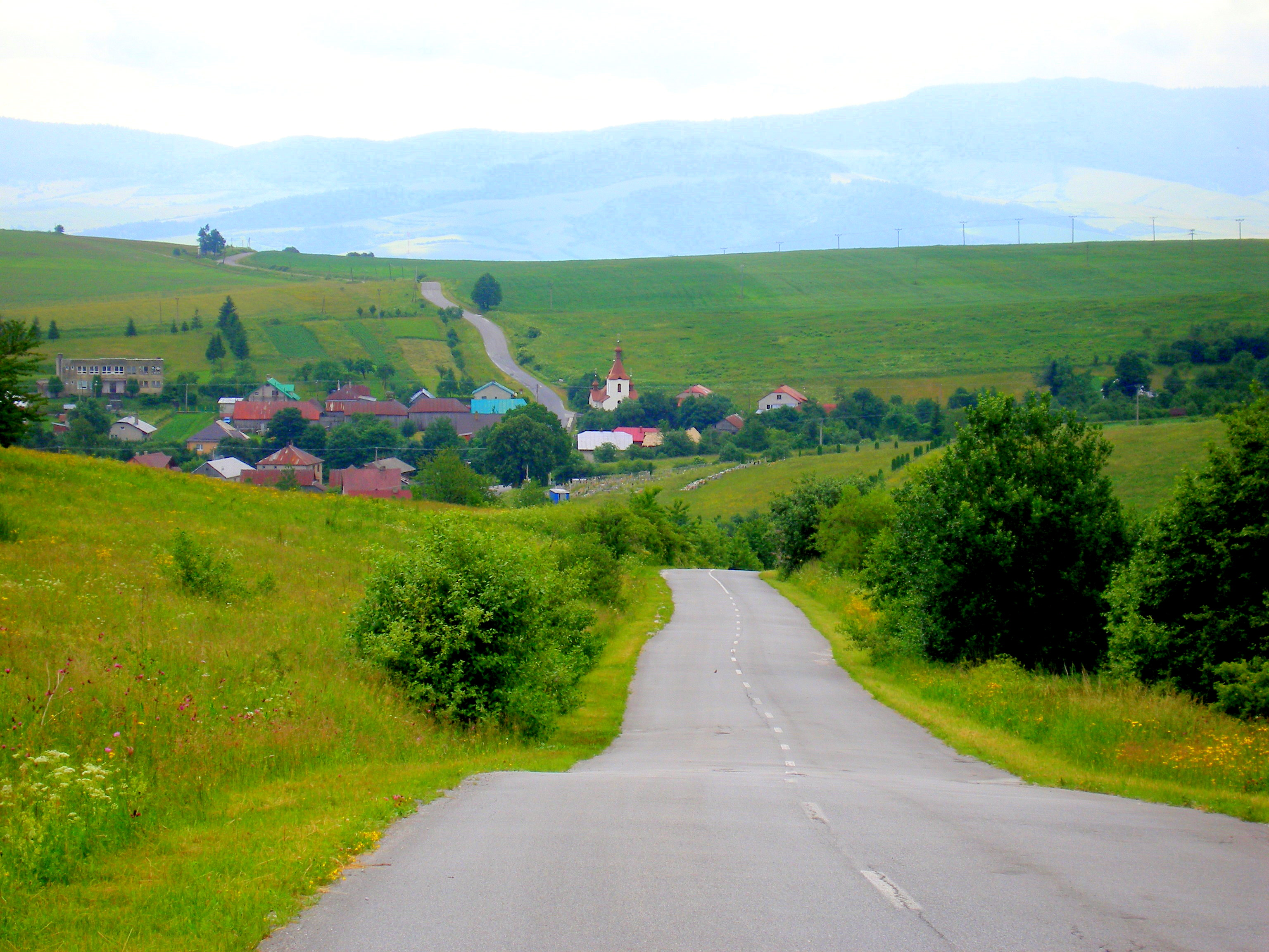 Obec Bajerovce okres Sabinov